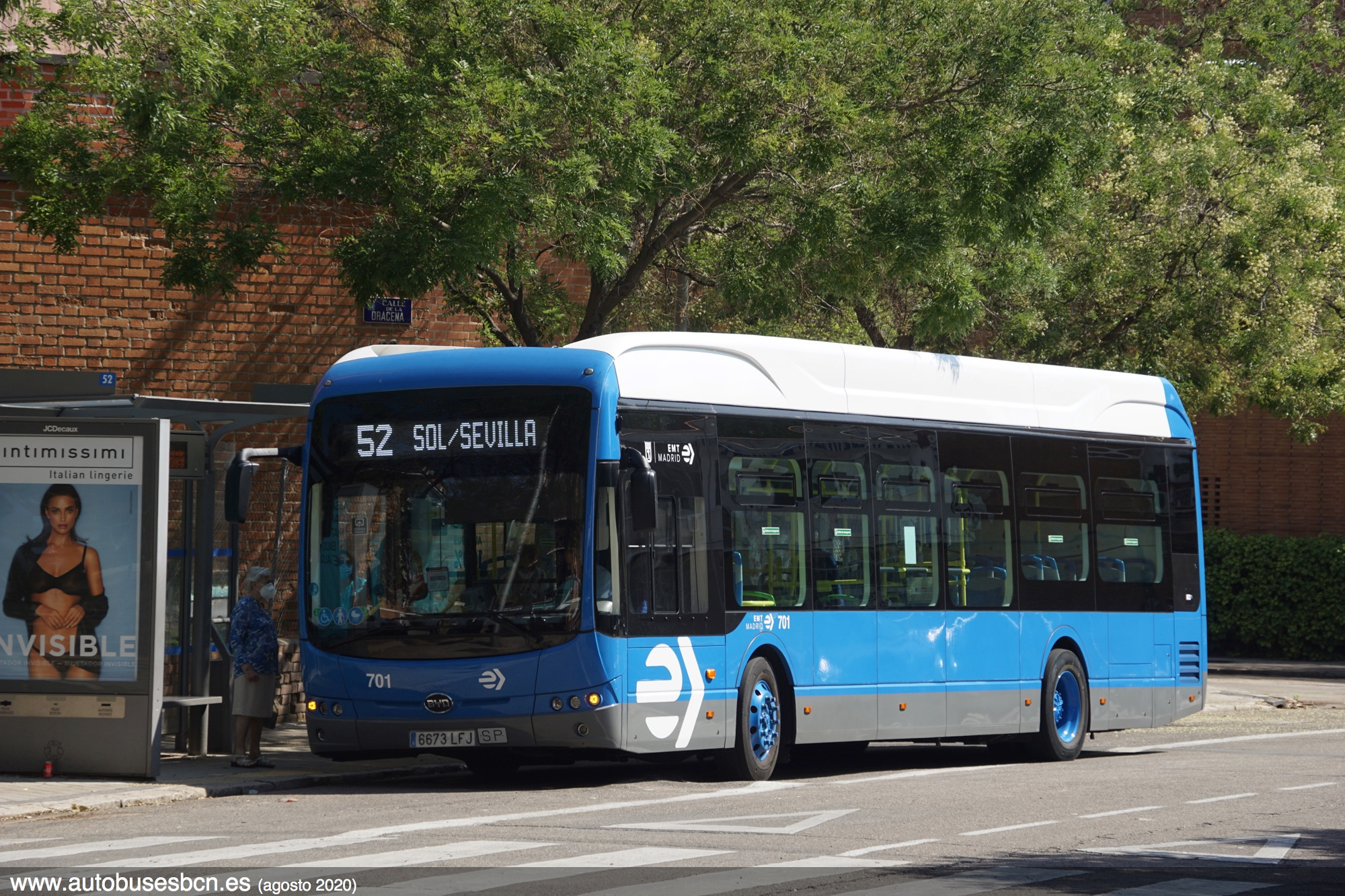 52 EMT Madrid en el final de Santamarca, en la calle Dracena